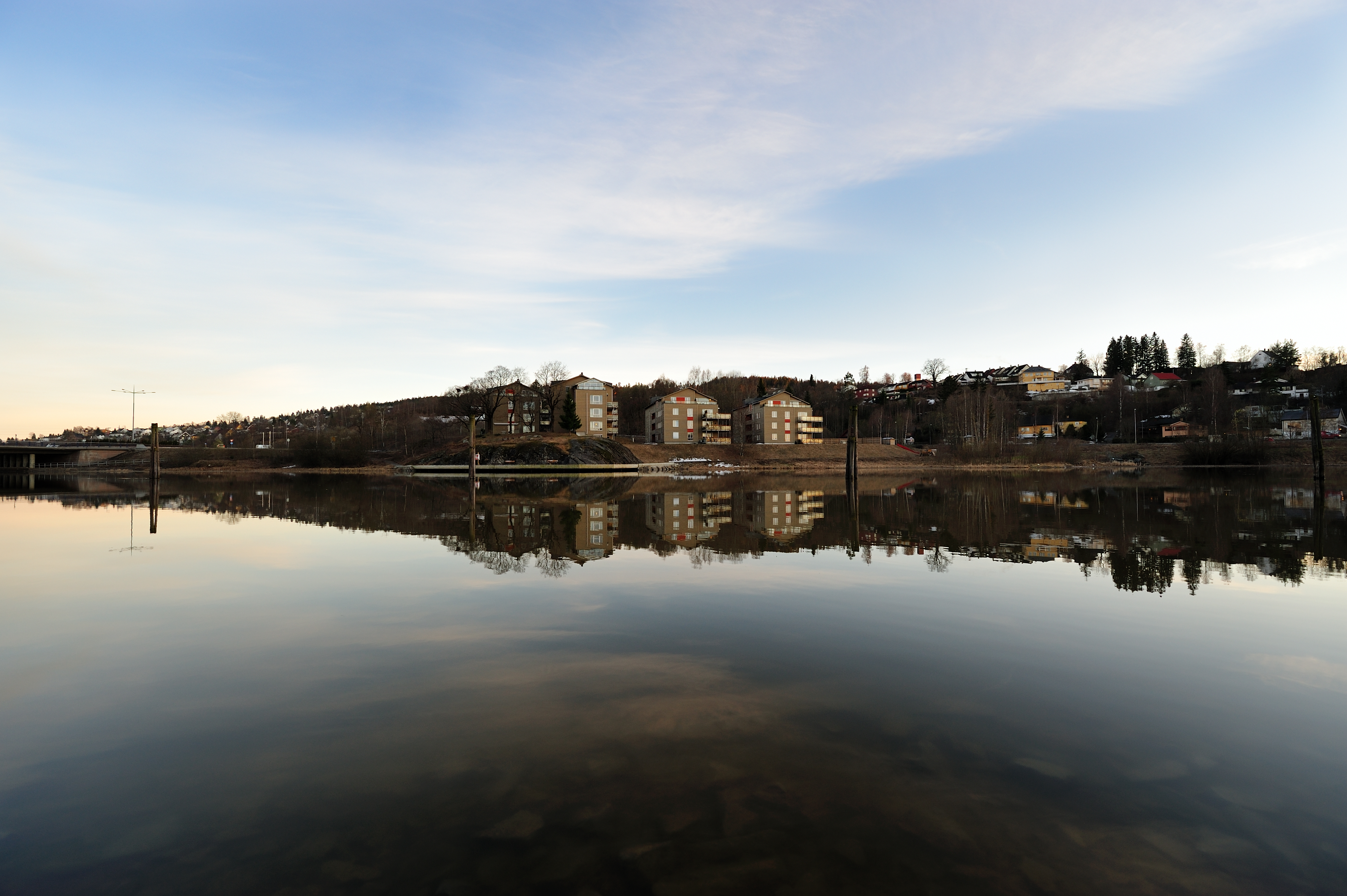 Dammensvika, Rælingen, Norway (Rudsberget and Nitelva)